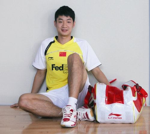 90后帅哥王睁茗的装备爱好